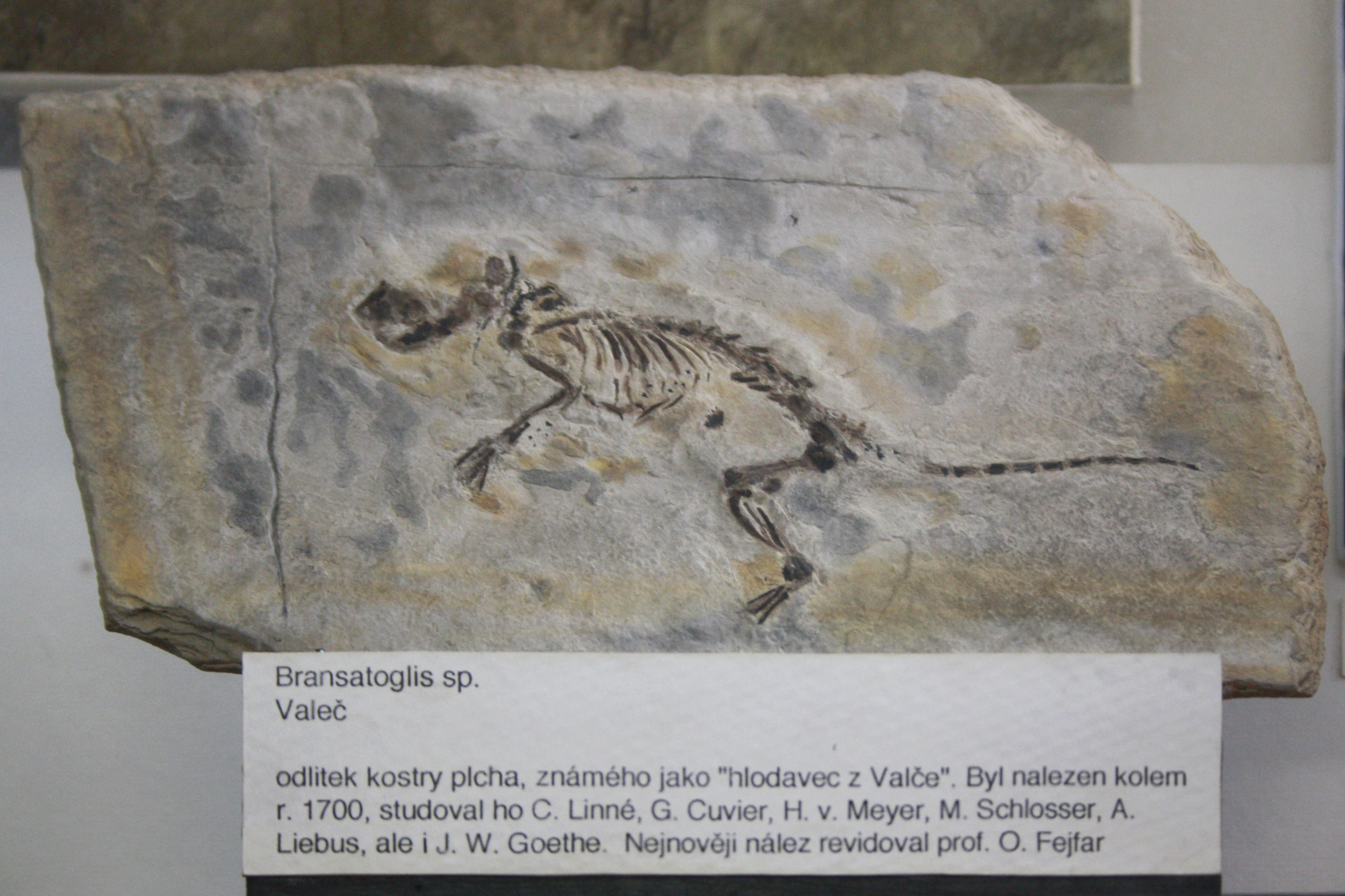 Národní muzeum v Praze na Václavském náměstí - odlitek kostry plcha známého jako „hlodavec z Valče“